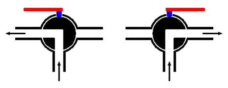 تصویر آموزشی